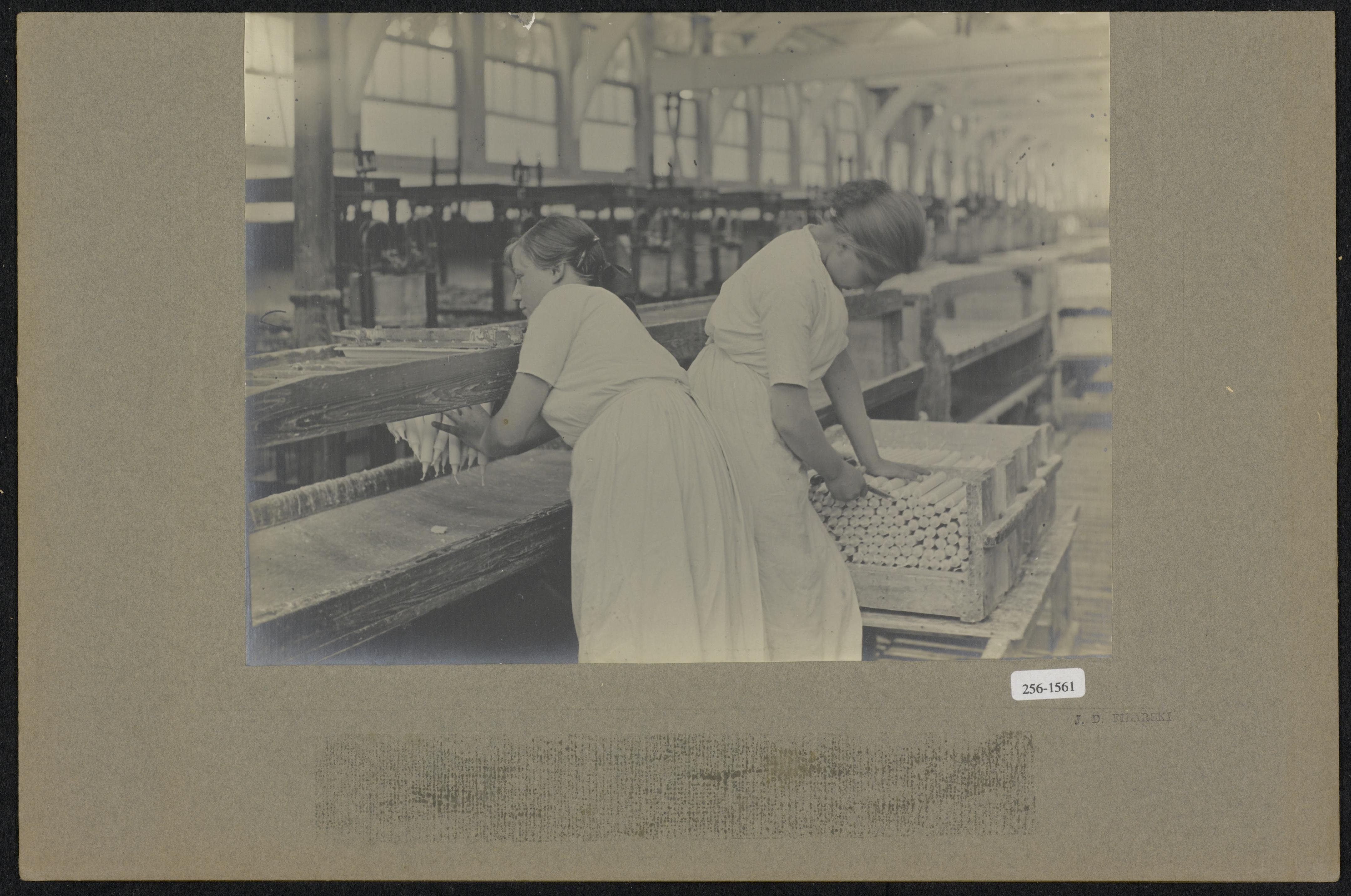 Collectie / Archief : Fotocollectie Arbeidsinspectie Reportage / Serie : Koninklijke Stearine Kaarsenfabriek te Gouda Beschrijving : [...]. Vrouwen pakken kaarsen van de band en knippen de lonten op maat Datum : 1919 Locatie : Gouda, Zuid-Holland Trefwoorden : kaarsenfabrieken, vrouwen Fotograaf : Filarski, Jan Daniel / Arbeidsinspectie Auteursrechthebbende : Nationaal Archief Materiaalsoort : Foto (zwart/wit) Nummer archiefinventaris : bekijk toegang 2.24.03 Bestanddeelnummer : 256-1561